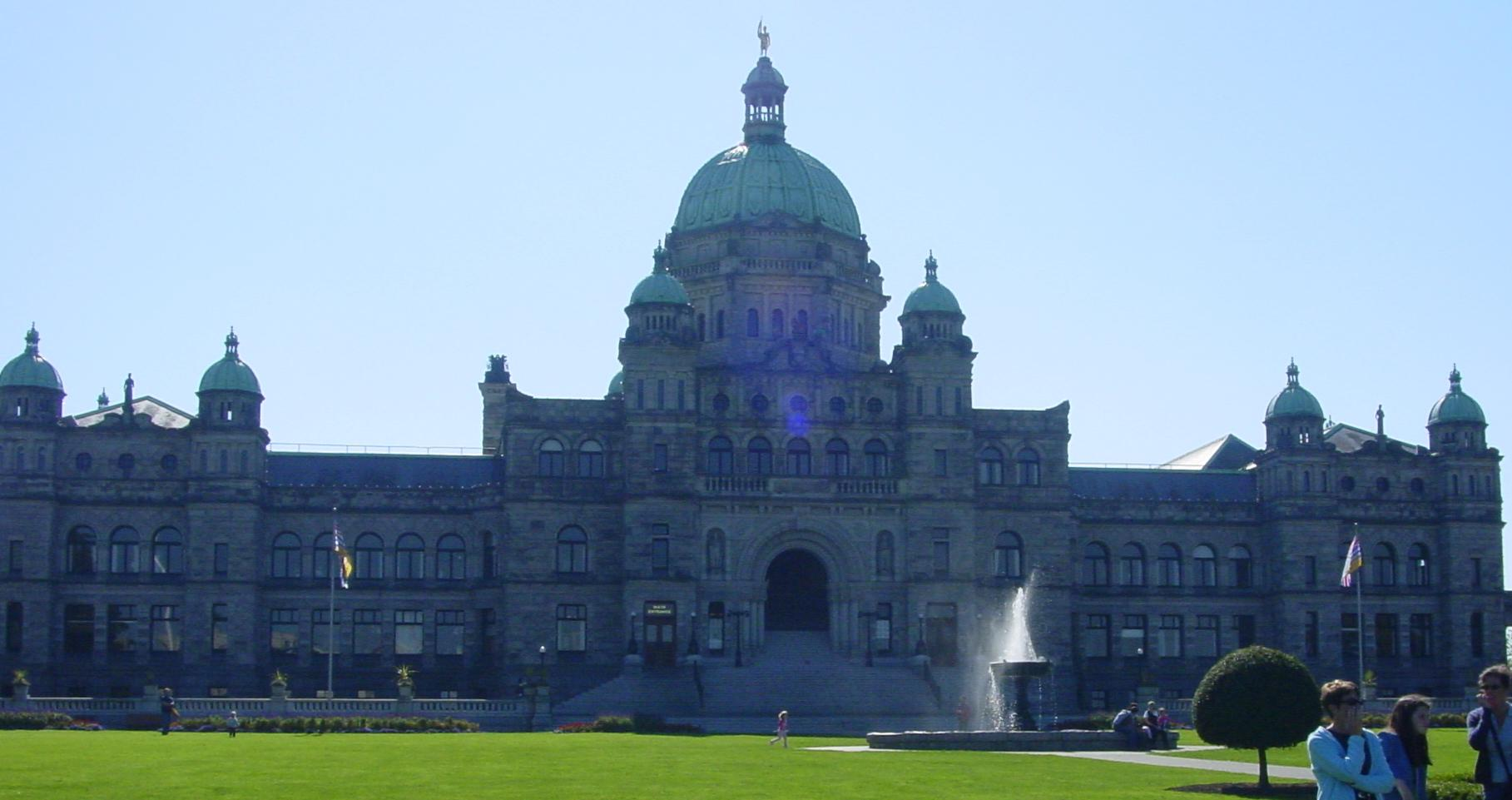 Parlamtensgebäude Victoria, British Columbia